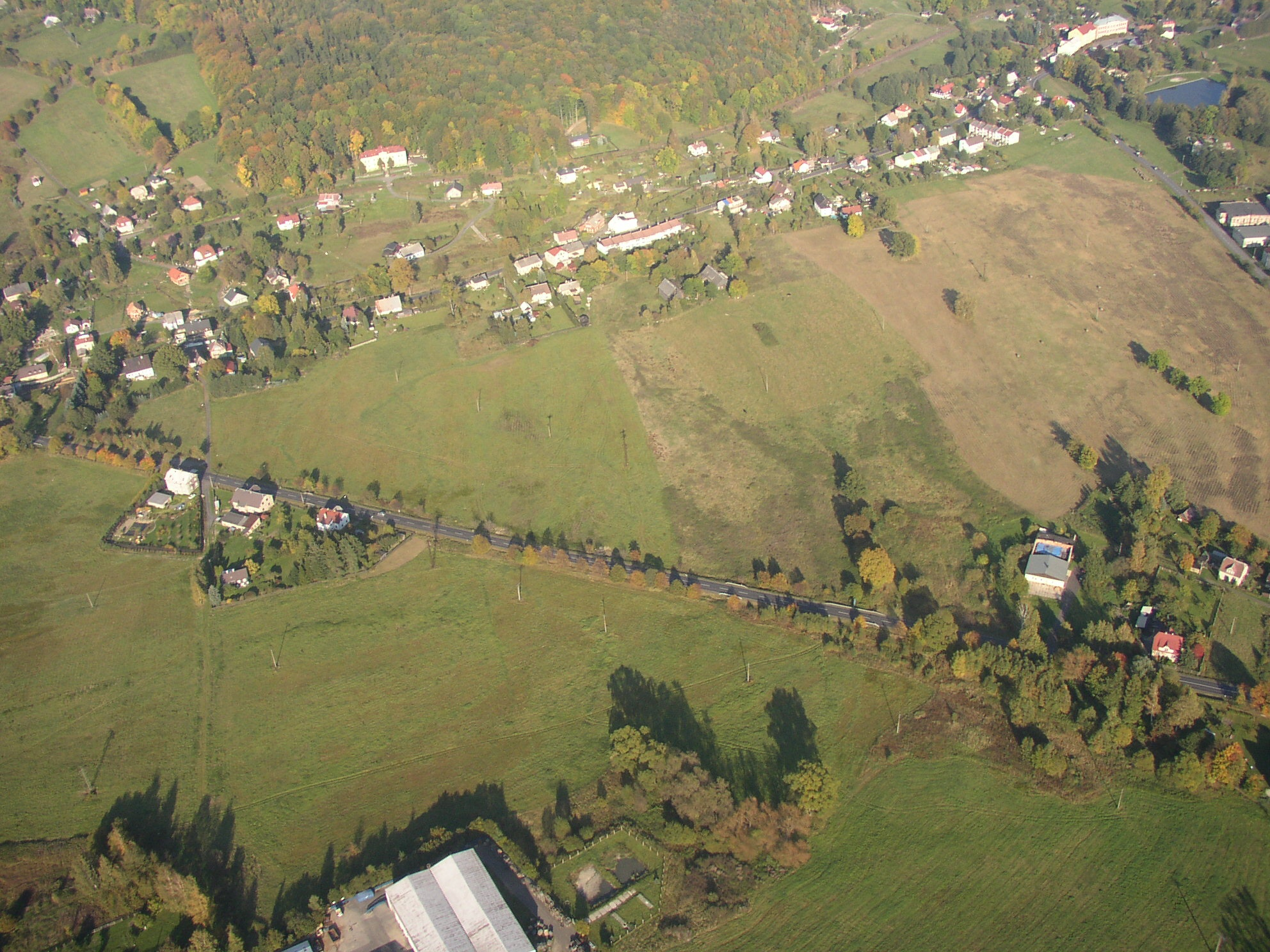 Letecký snímek západní části obce Dolní Podluží